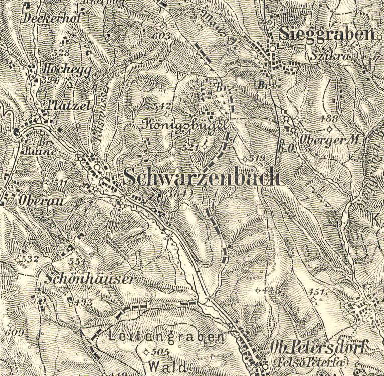 Schwarzenbach, Niederösterreich, an der ehemaligen Grenze zwischen dem deutschen Reich und Ungarn (heute: Niederösterreich und Burgenland in Österreich), Ausschnitt aus File:Spezialkarte 4957 Ödenburg.jpg